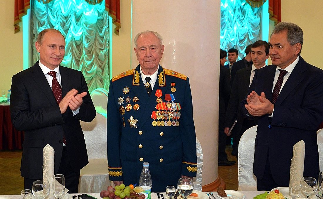 Владимир Путин поздравляет Дмитрия Язова с 90-летием